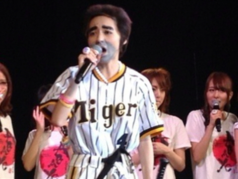 한신 타이거즈 분장을 한 키시 아이노